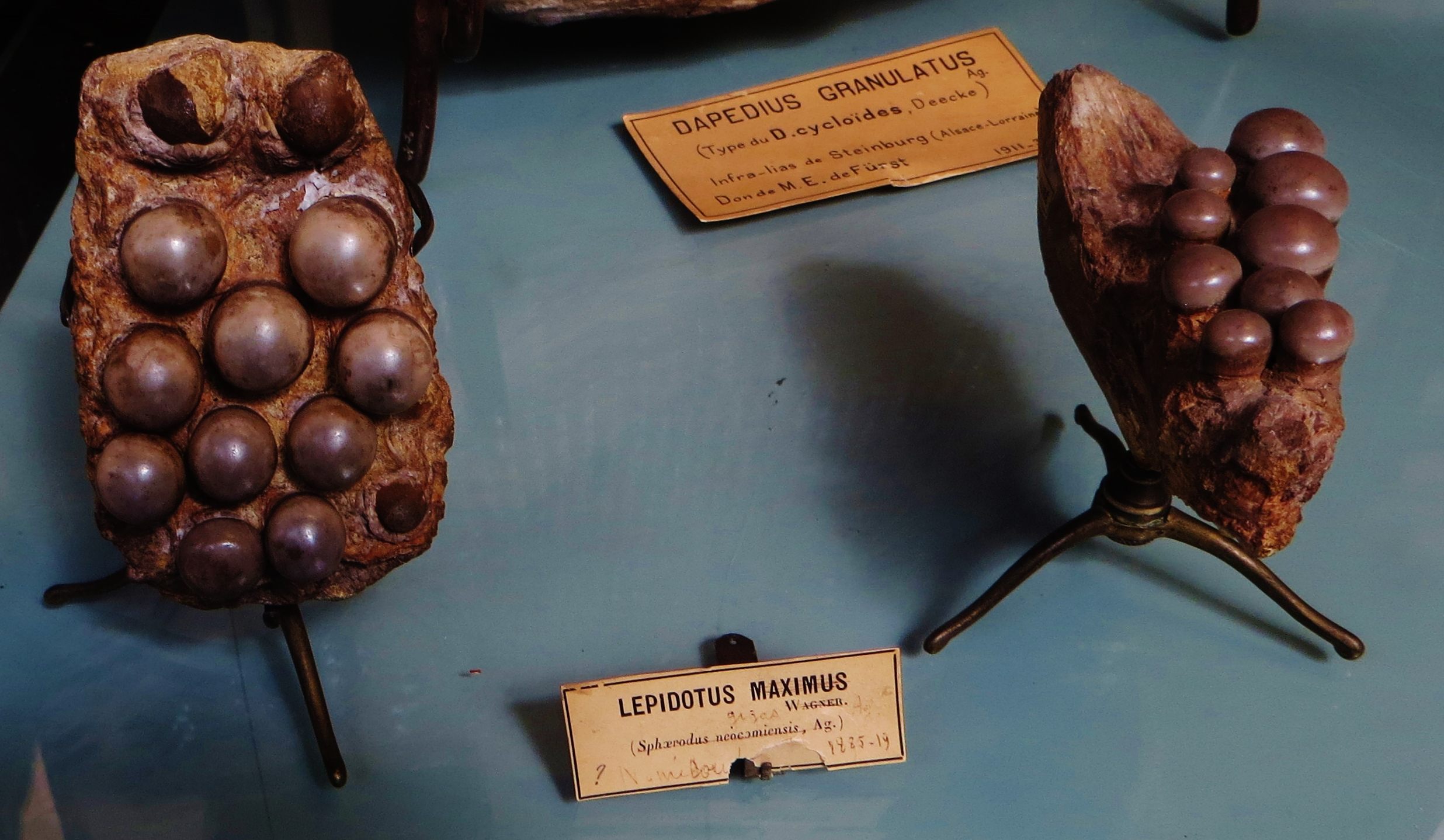 Fossil of Lepidotes, an extinct fish- Took the photo at Musee d'Histoire Naturelle, Paris